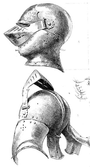 Classic Armet by Eugène Emmanuel Viollet-le-Duc